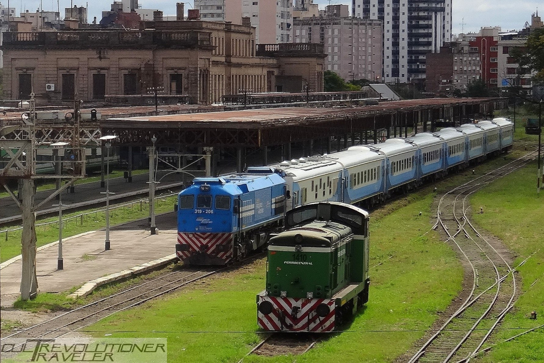 se observan una locomotora English Electric y otra GM serie 319 moviendo coches de pasajeros